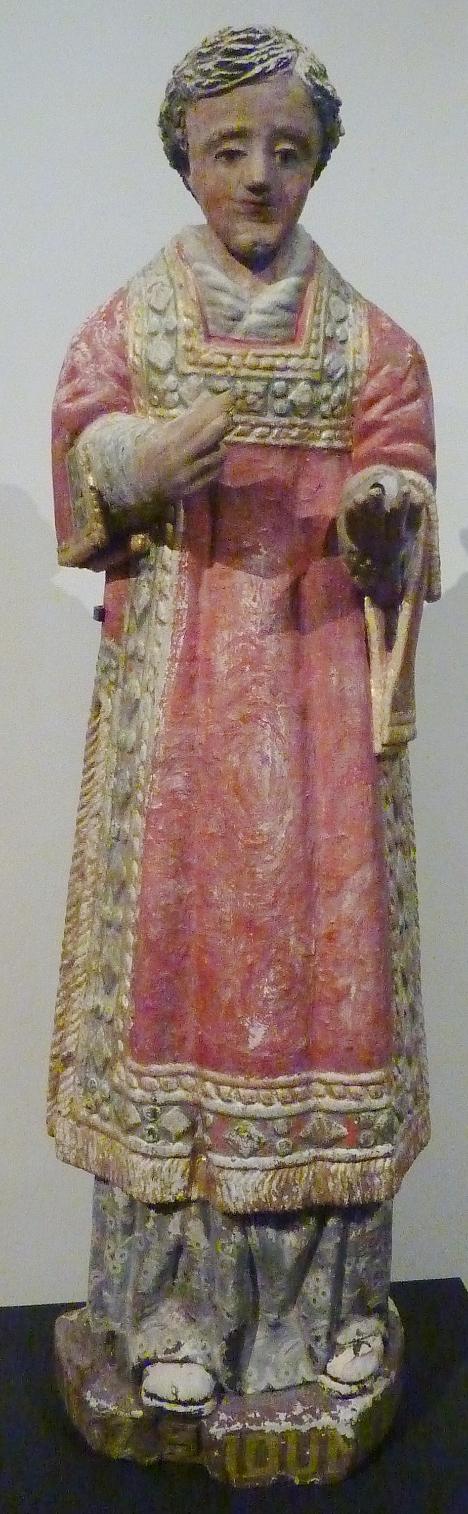 Trégourez : statue de saint Idunet datant de 1562 (église paroissiale de Trégourez). Le saint est représenté en diacre.Statue en bois polychrome classée monument historique en 2002.